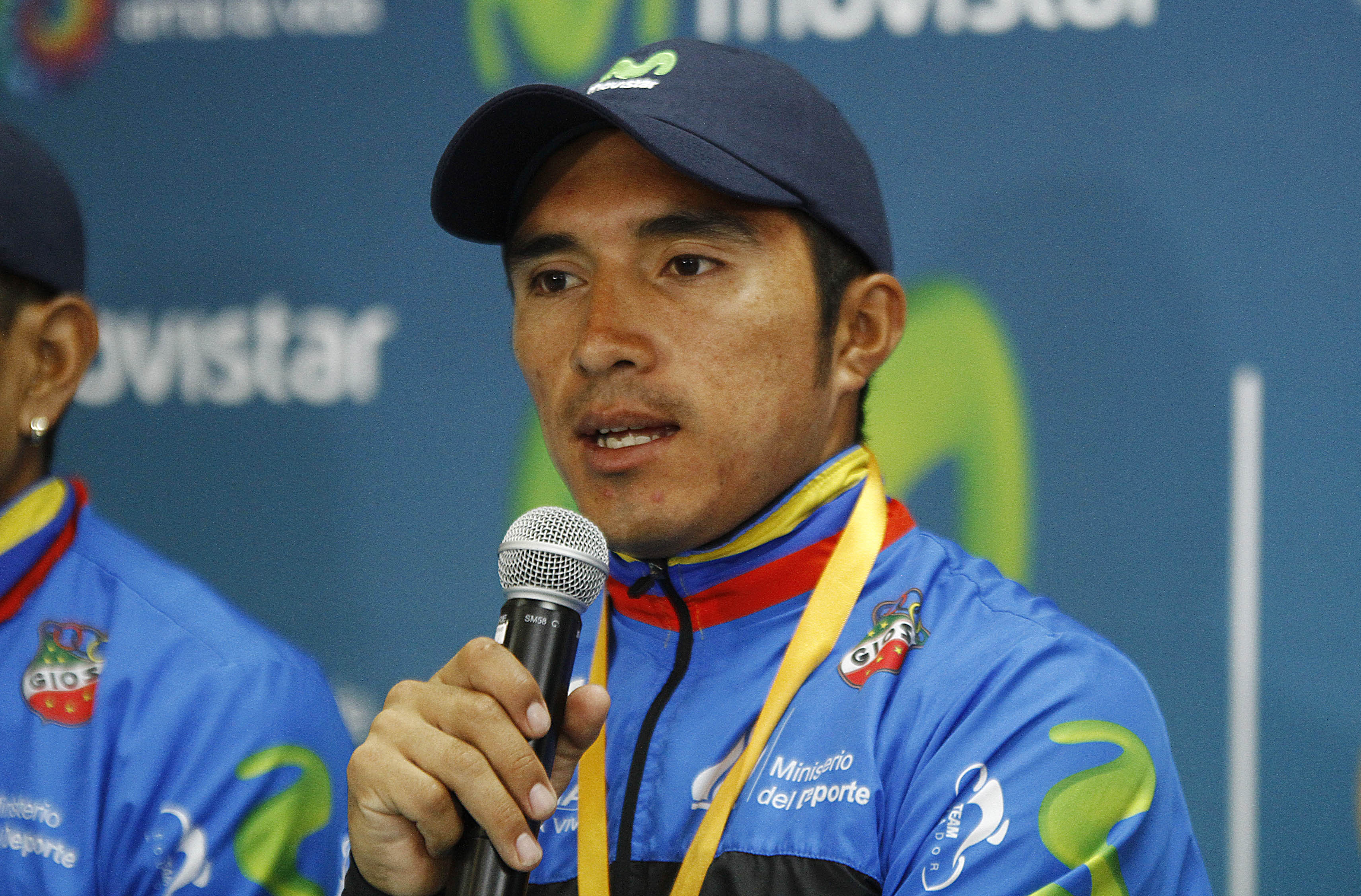 BYRON GUAMA 7 MAV